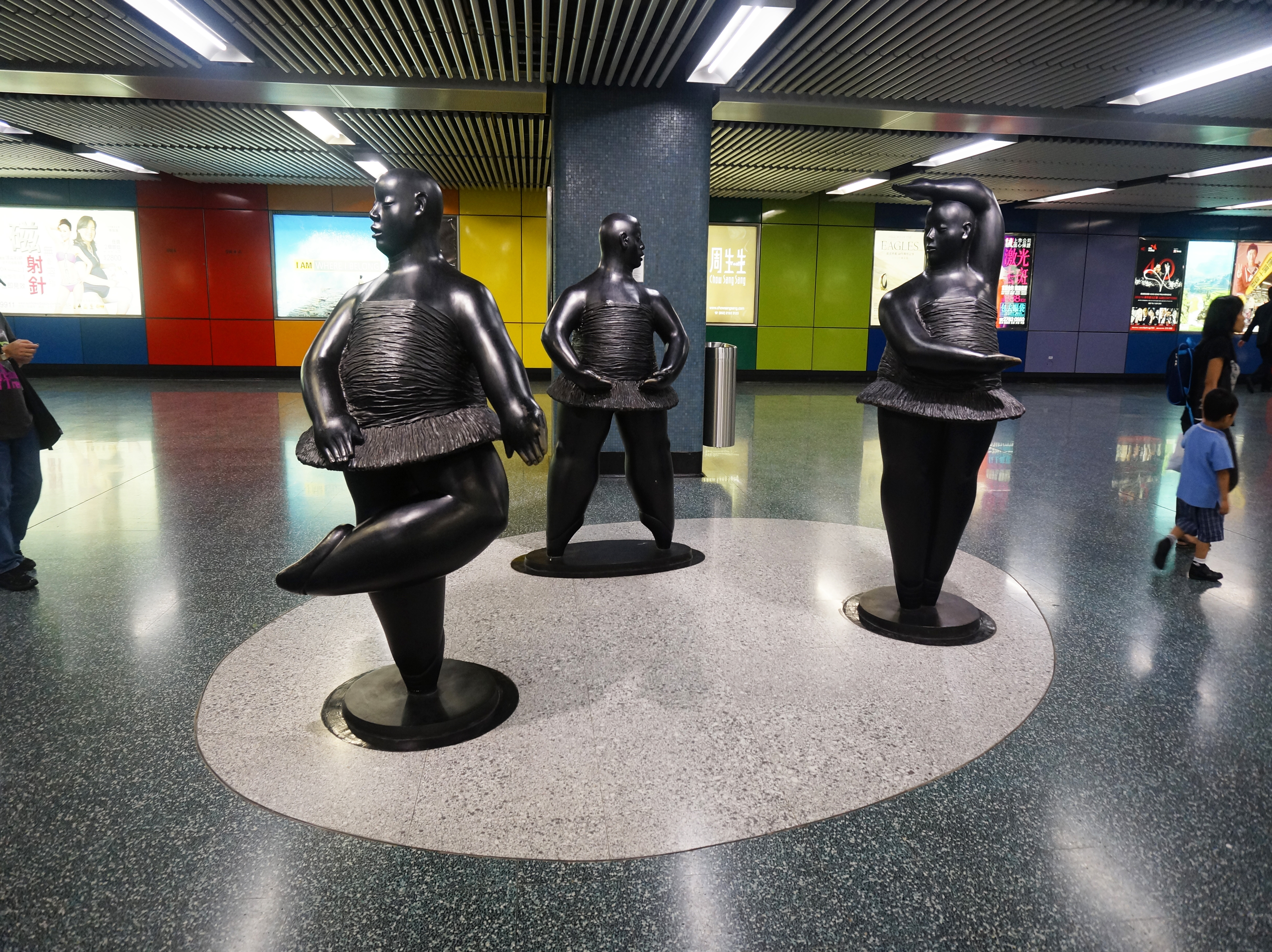 港鐵彩虹站藝術品